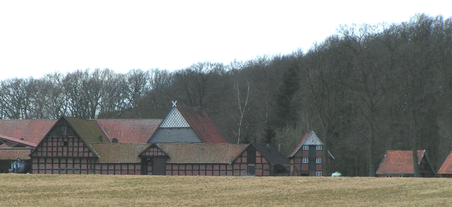 Hofanlage bei Gehrde